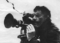 Il regista Giulio Questi fotografato nel 1967